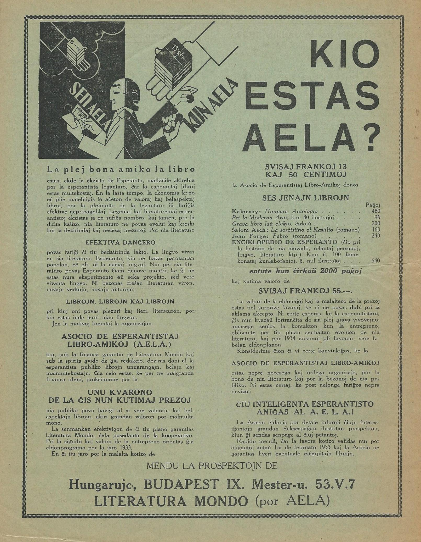 el la revuo "Esperanto" (speciala numero), nov. 1932